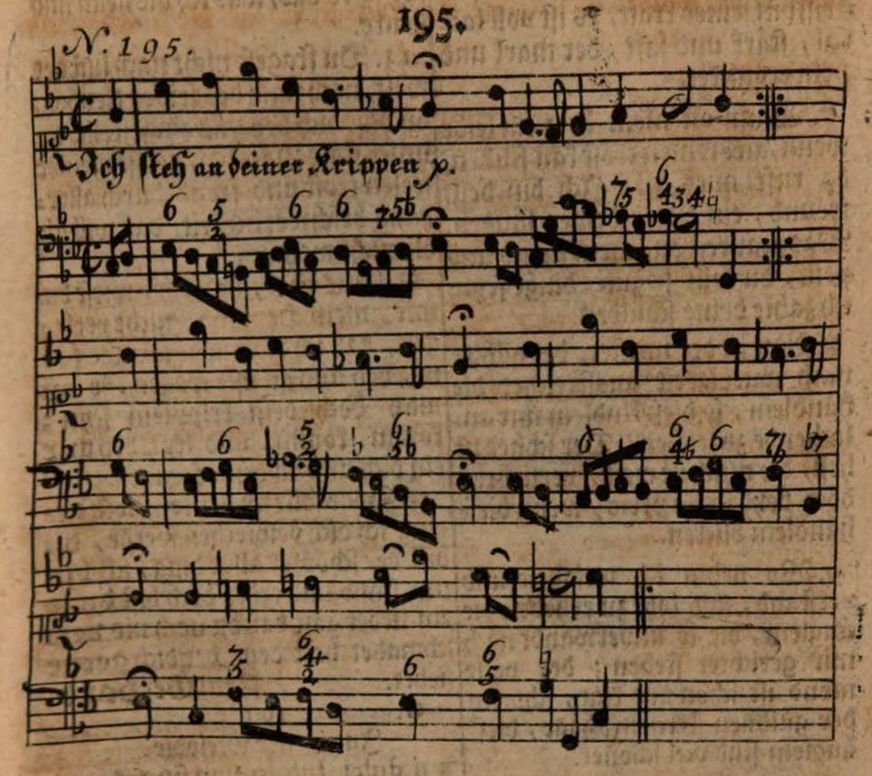 Johann Sebastian Bach: Ich steh an deiner Krippen hier, Melodie mit beziffertem Bass, in Schemellis Musicalischem Gesangbuch, Leipzig 1736